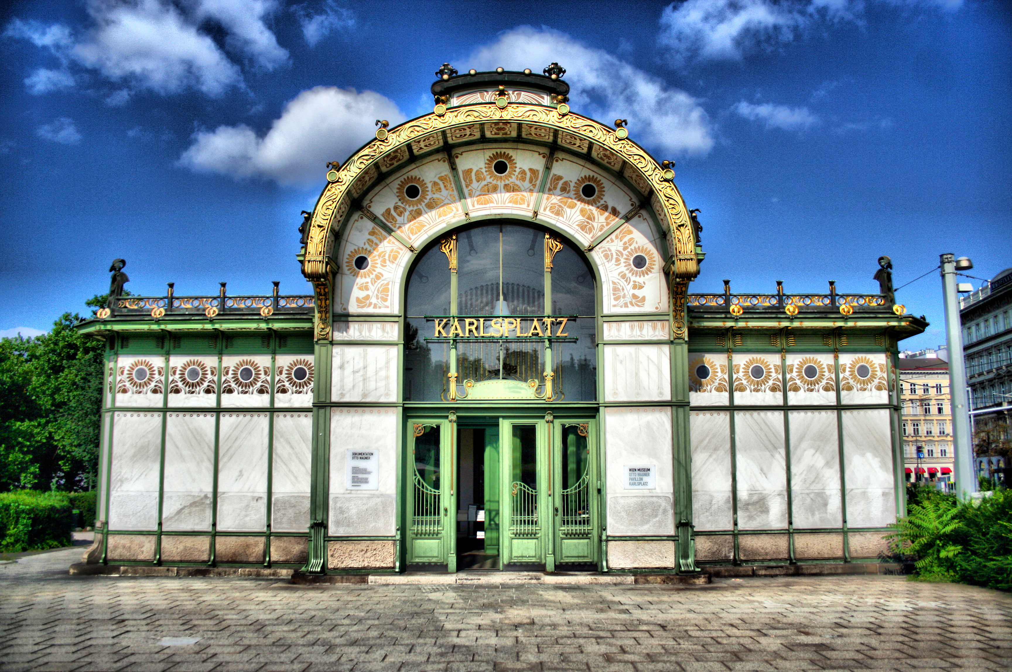 Karlsplatz 2 Pavillons und Teilabschnitt der ehem. Stadtbahn